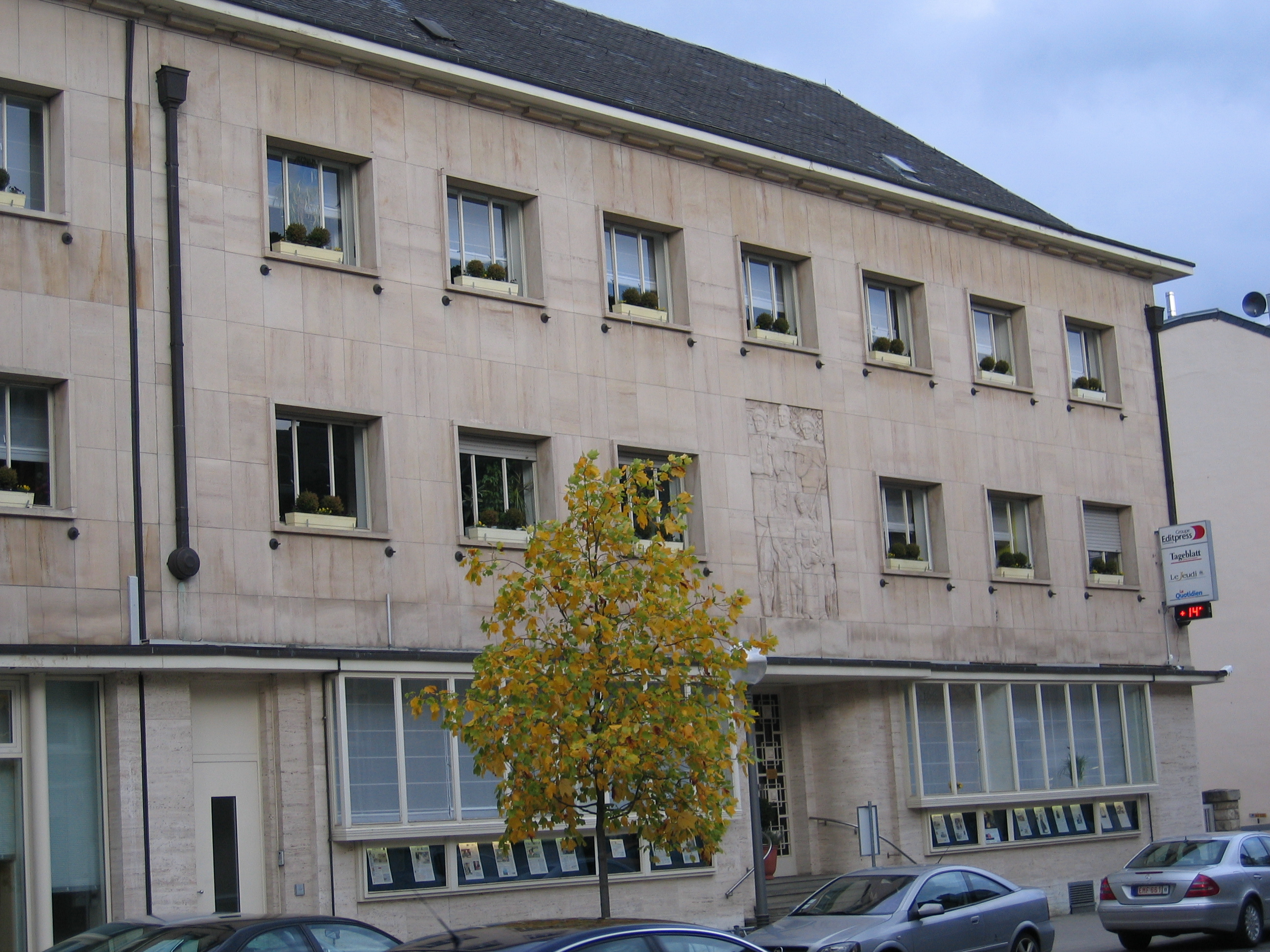 De Sëtz vum Tageblatt an der Escher Kanalstrooss. Oktober 2005.